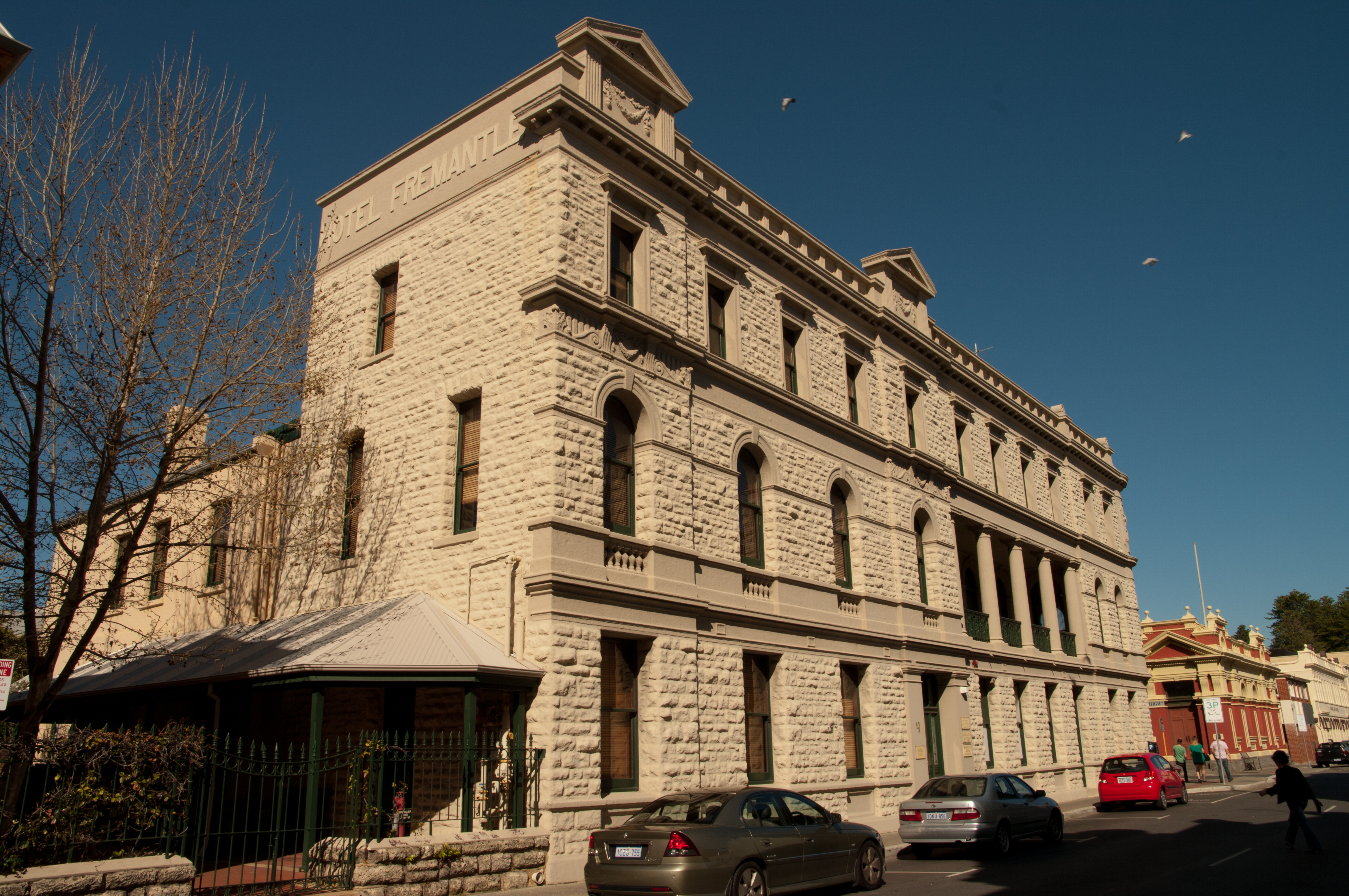 Hotel Fremantle